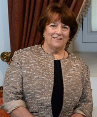 Adriana Delpiano, política chilena.